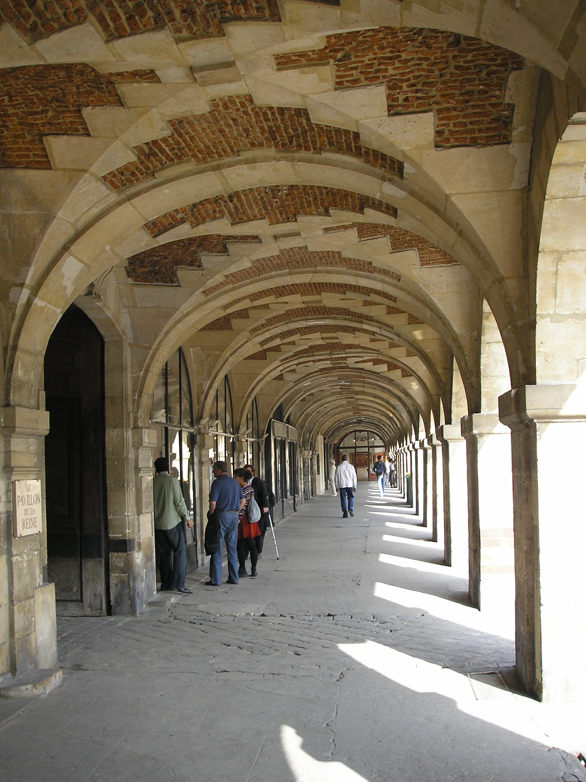 Place des Vosges in Paris, arcades at the Pavillion de la Reine side.